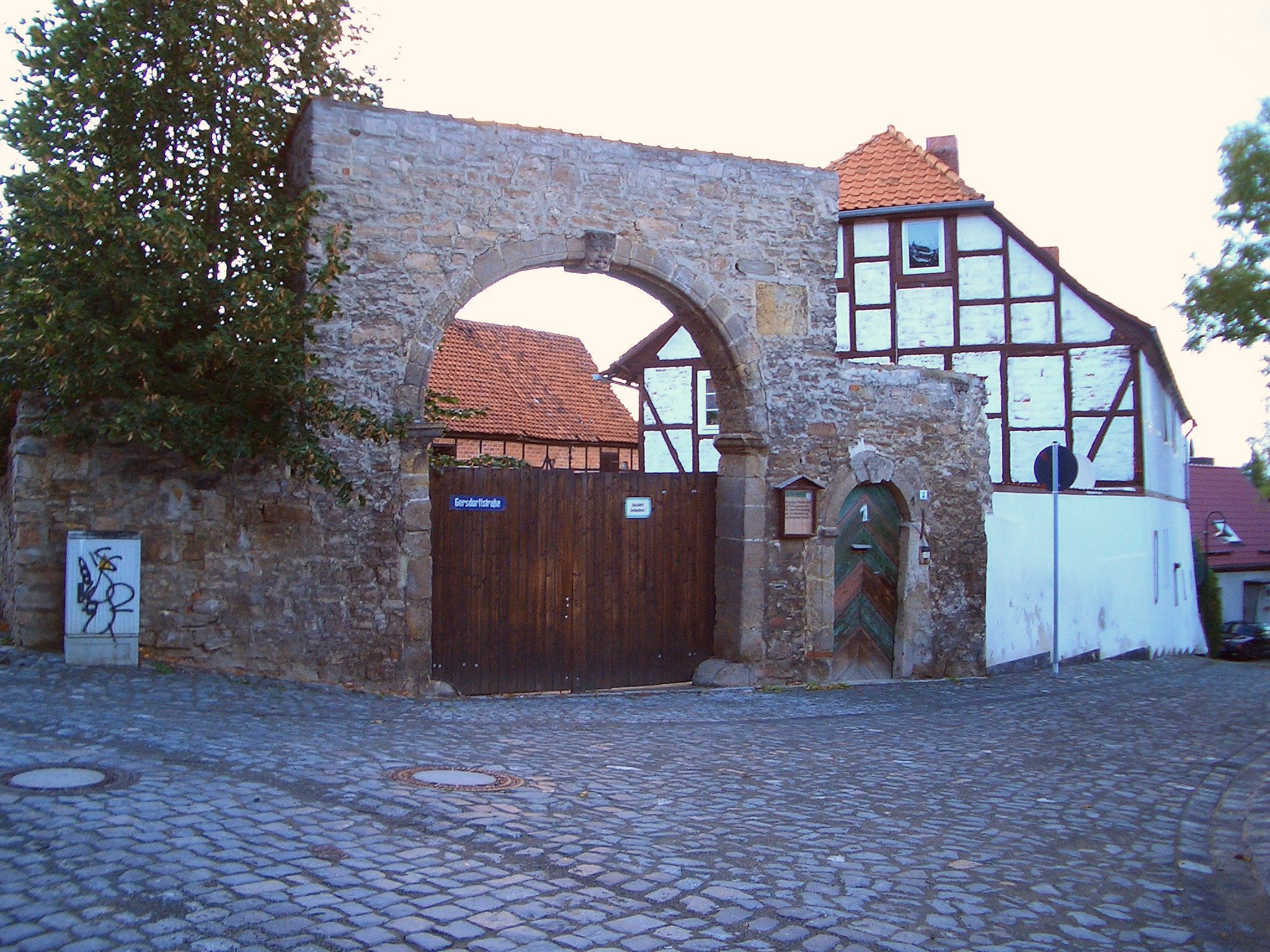 Tor des Bläkhofes